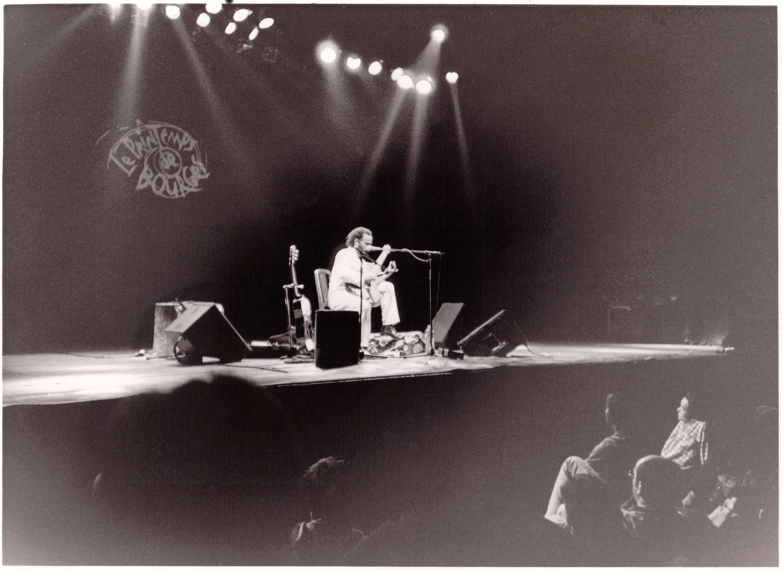 Concert au Printemps de Bourges